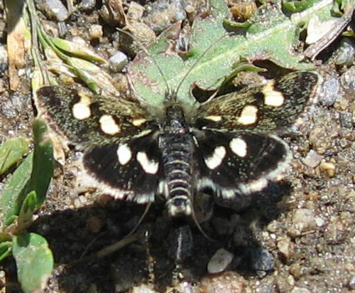 Eurrhypis pollinalis (Denis & Schiffermüller, 1775) (Pyraloidea, Lepidoptera), Cerdagne, Dépt. Pyrénées Orientales, ca. 1600 m Höhe, naturnahe Wiese